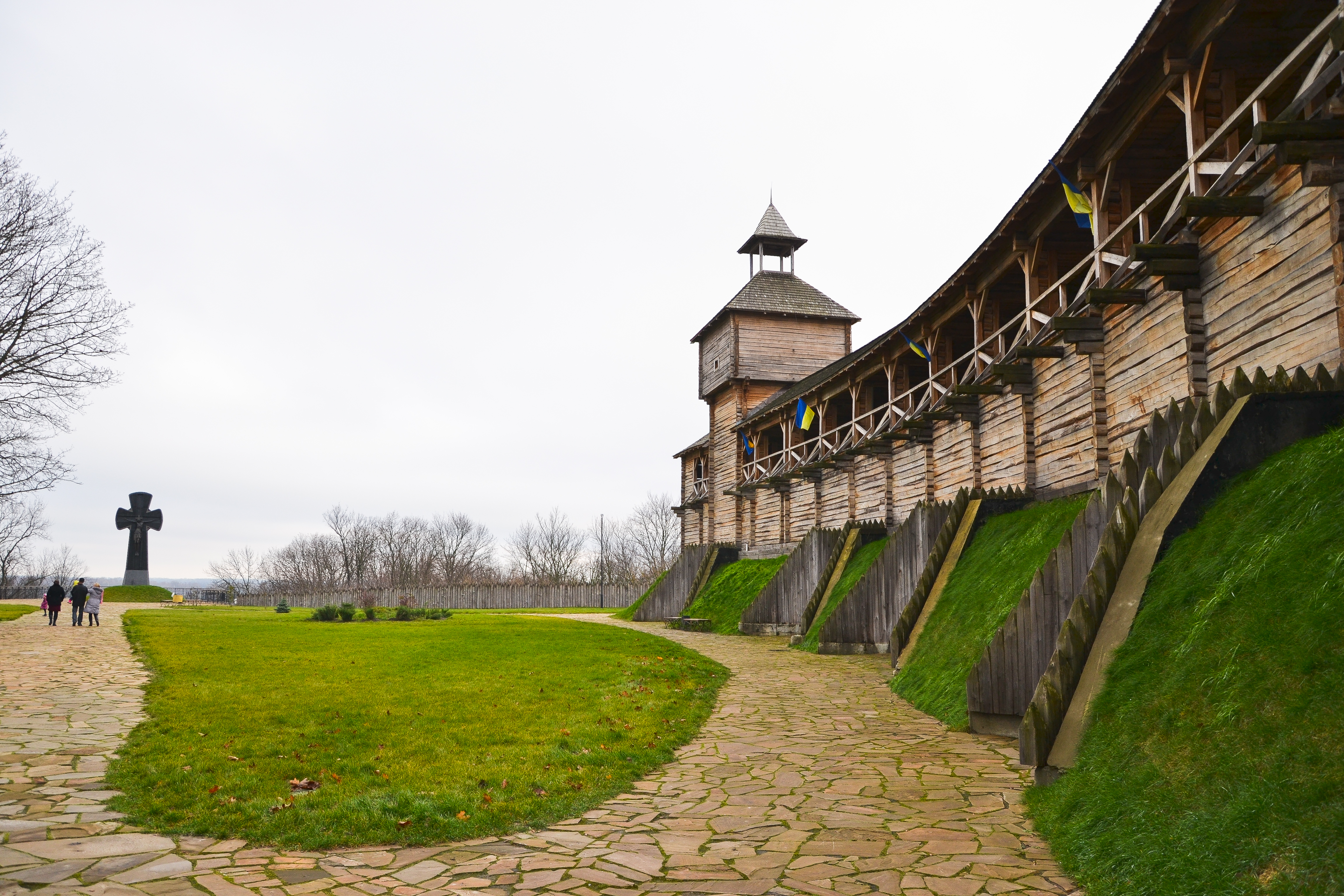 Поселення укріплене багатошарове «Батуринська фортеця», Батурин, між вулицями Партизанською, Петровського, Радянською та провулками Партизанським і Петровського